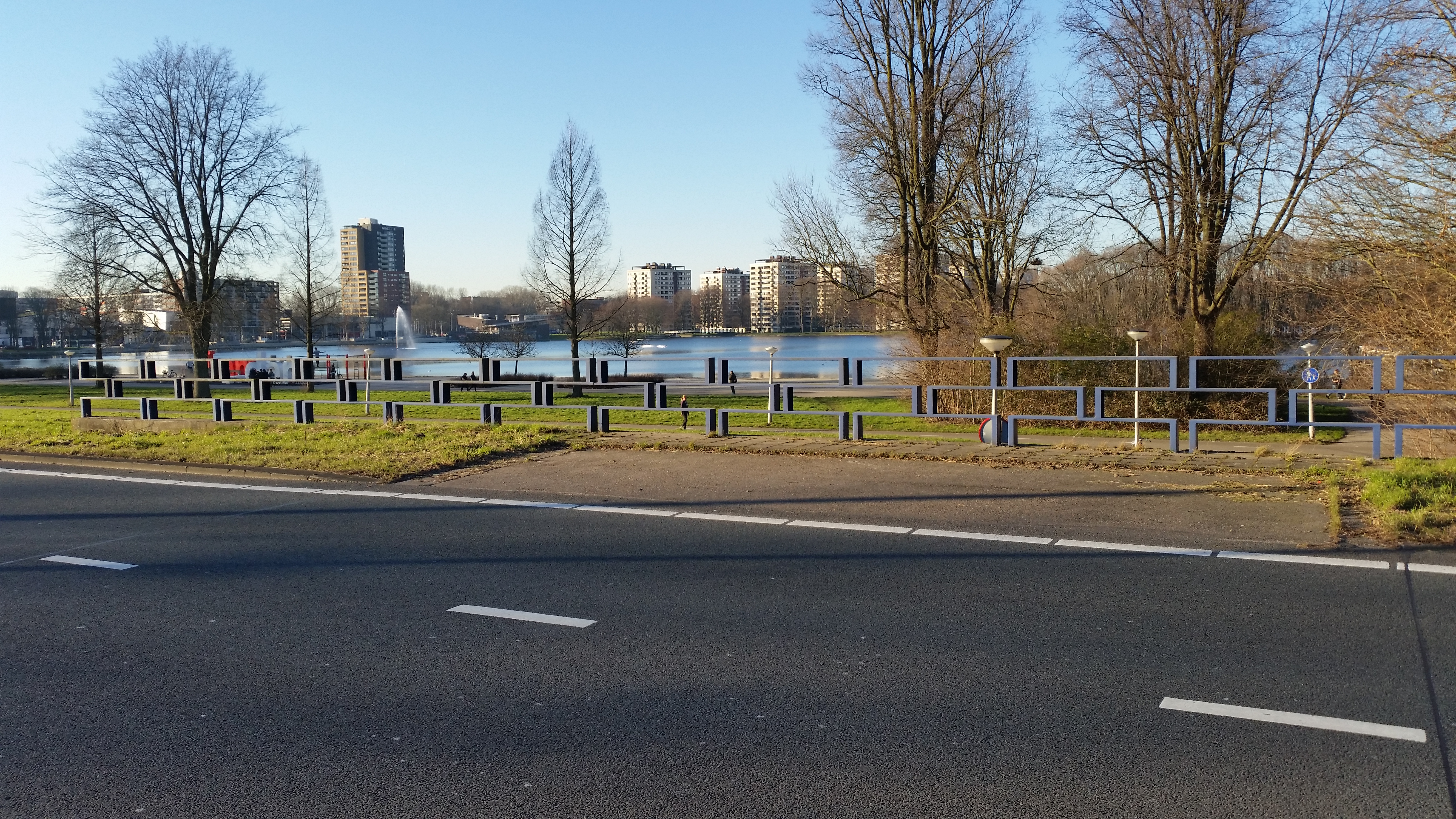 Leuning van Brug 758 (in Amsterdam) met op de achtergrond de Sloterplas met daarachter de lage torenflats van Torenwijck